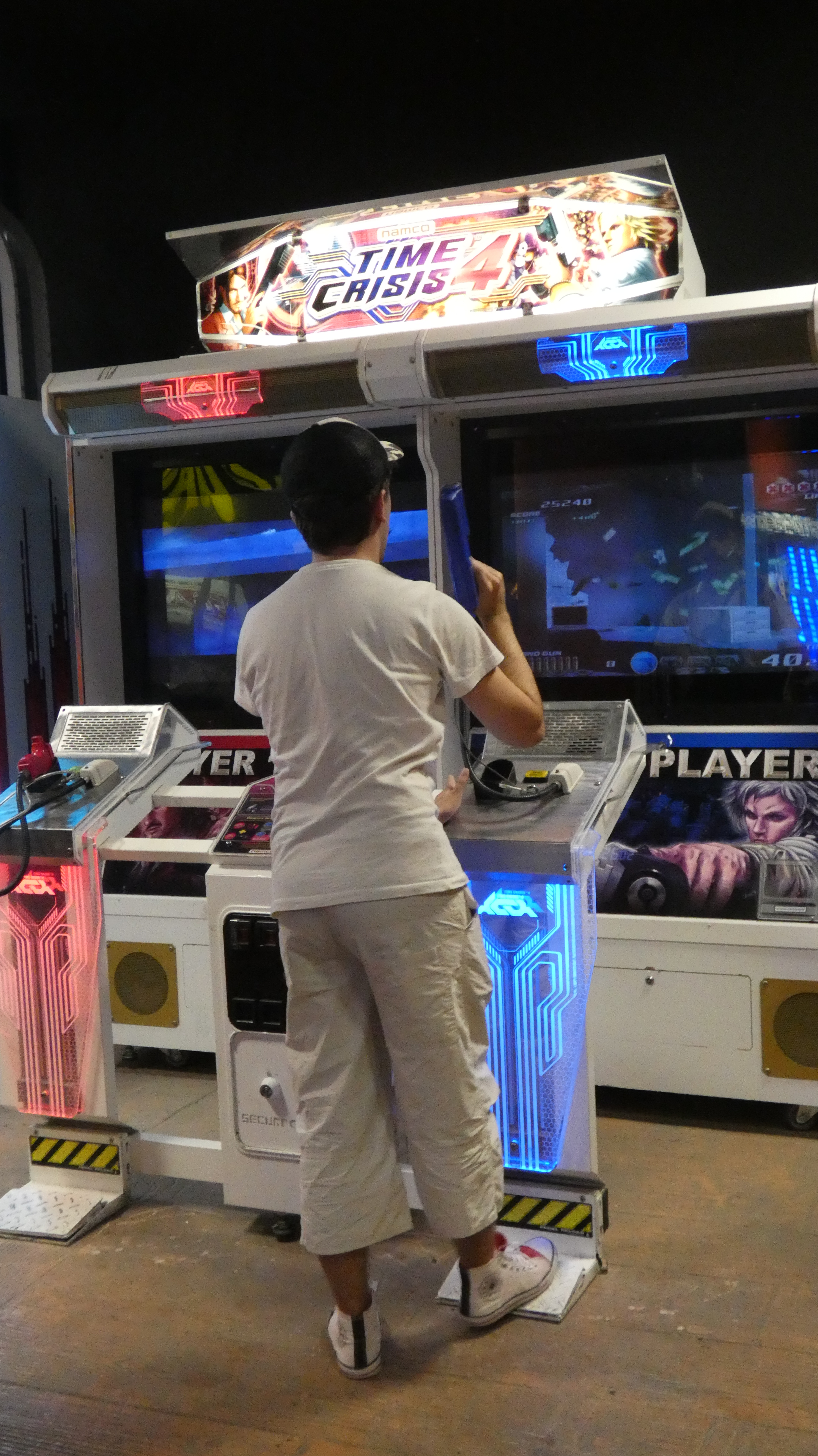 Time Crisis 4